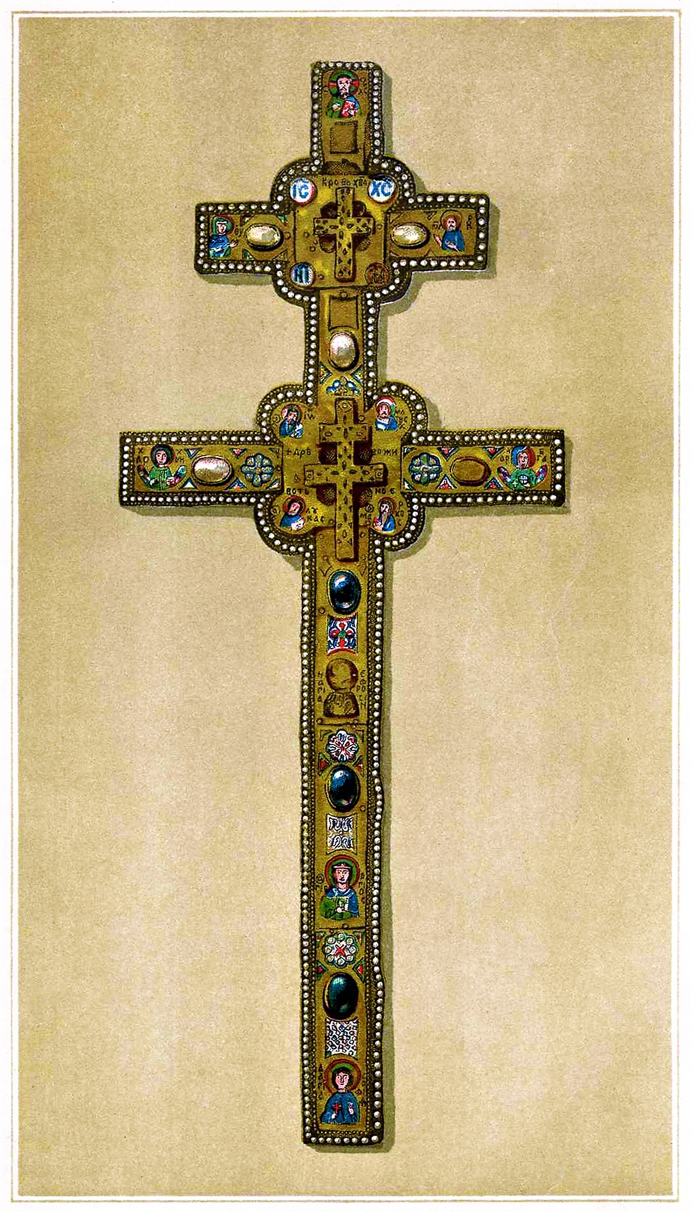 Беларуская (тарашкевіца): Крыж Эўфрасіньні Полацкай (Kryž Eŭfrasińni Połackaj)